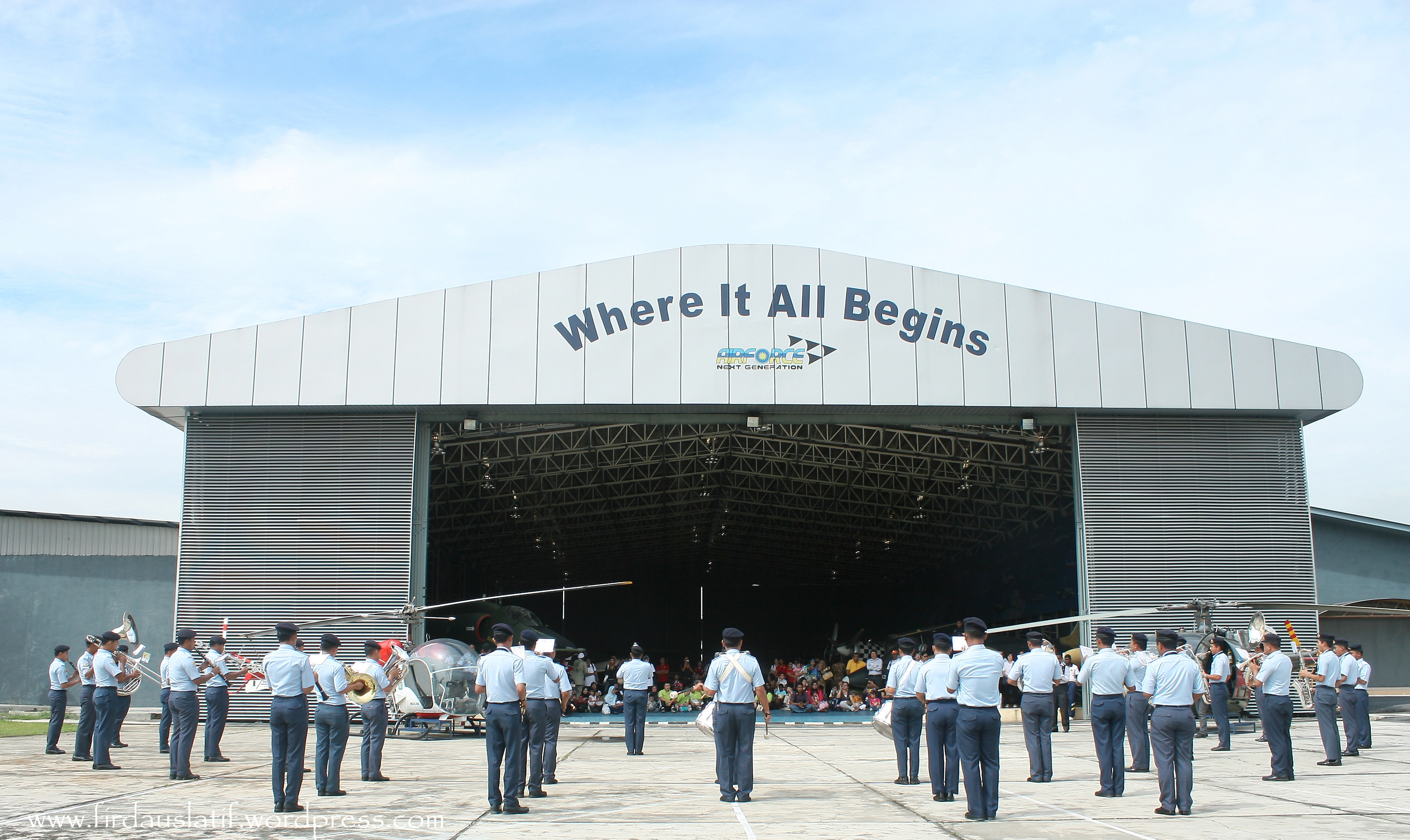 Muzium Tentera Udara di Sungai Besi